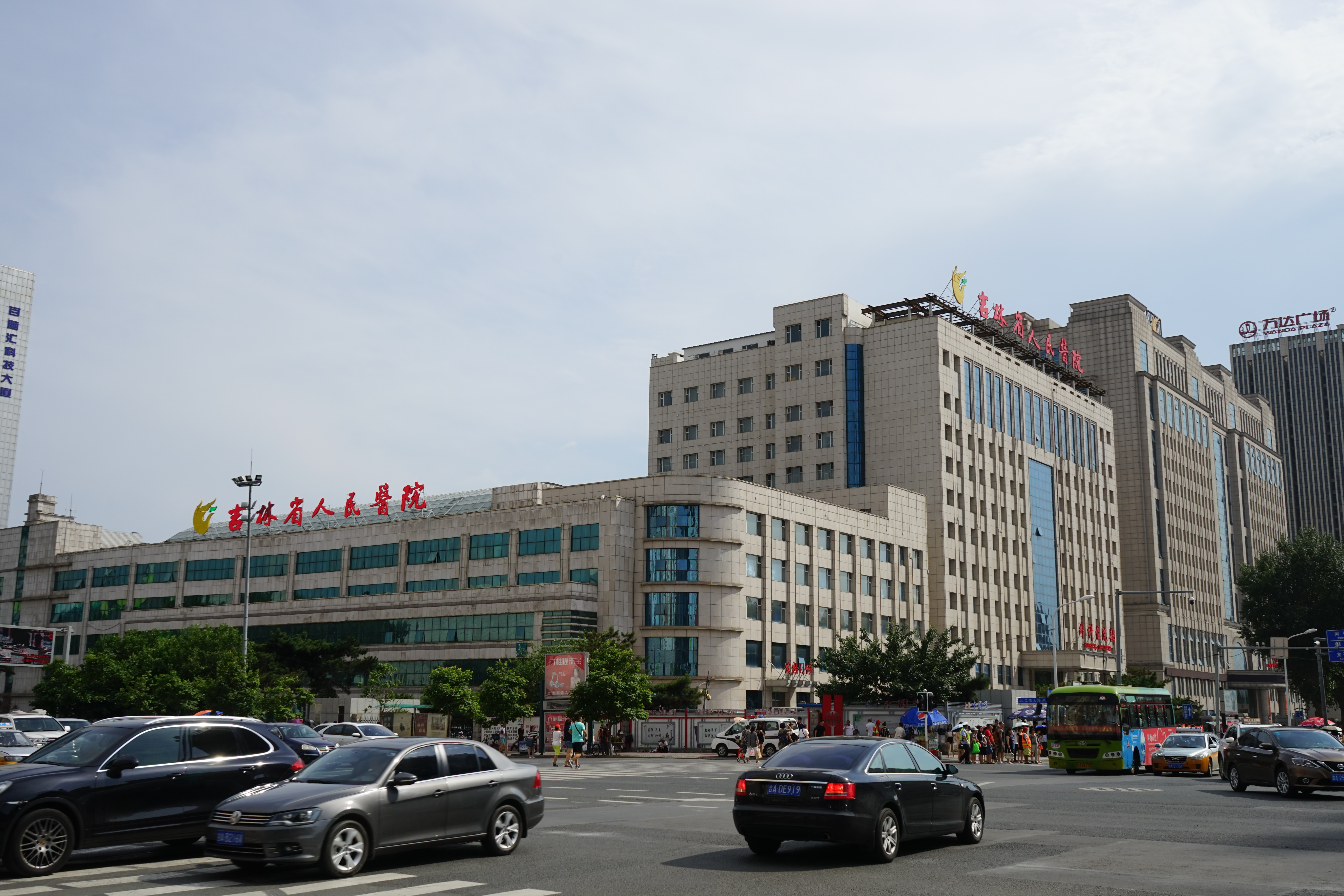 中文（中国大陆）: 吉林省人民医院